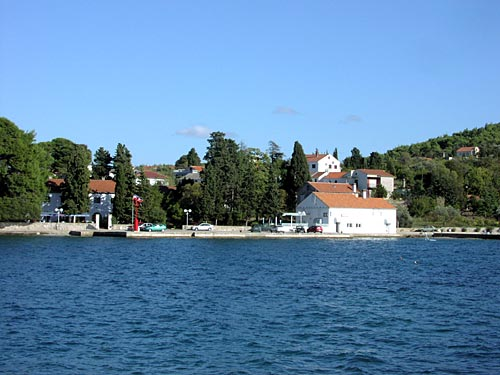 == Dozvola ==